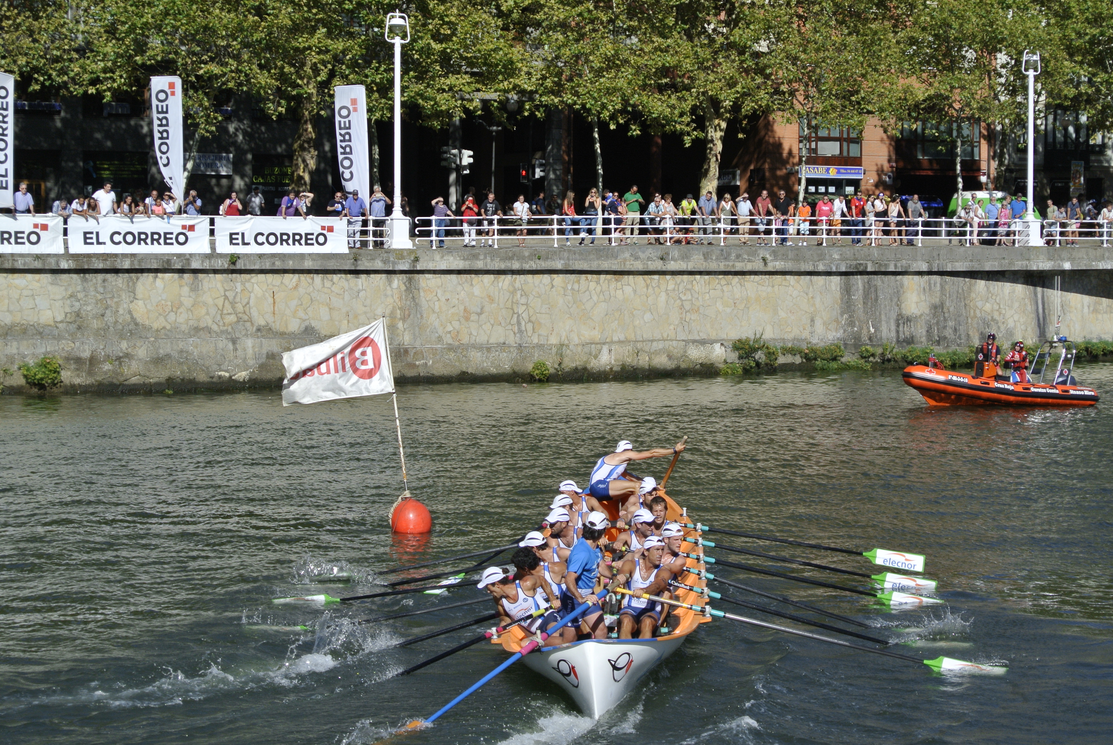 Isuntza en la última regata de la liga ARC 1 2017